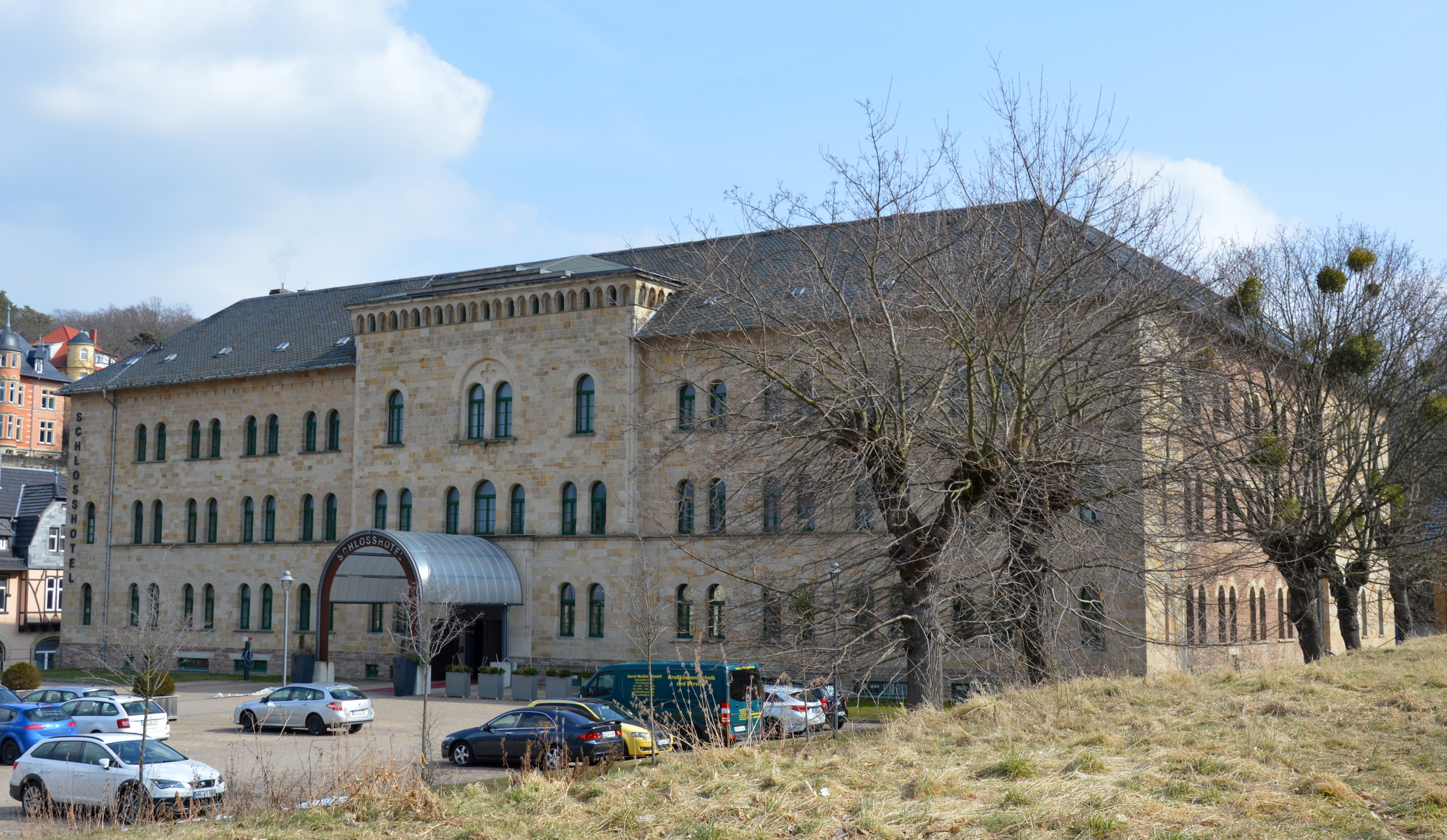 Haus Schloßberg 5 in Blankenburg